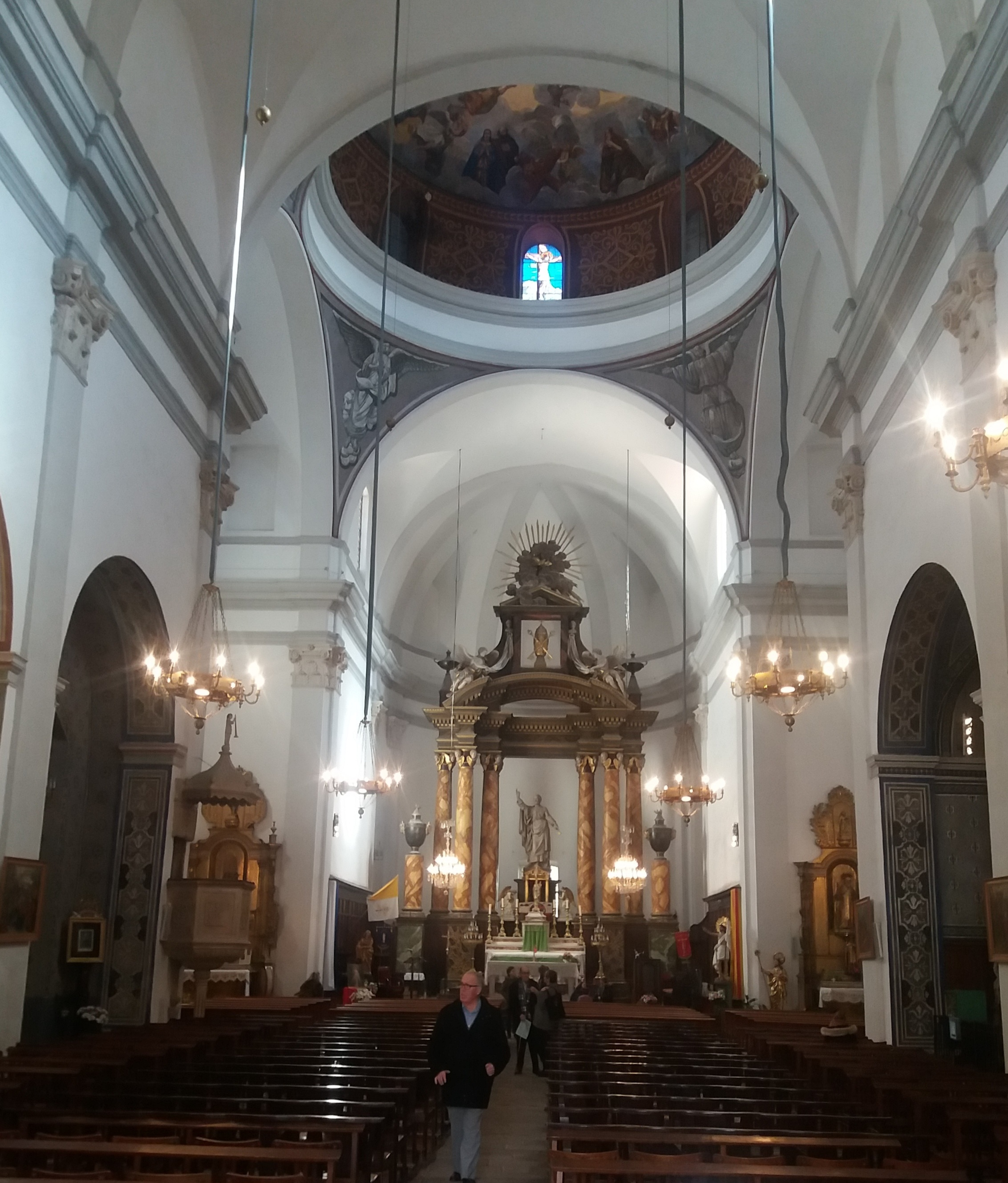 Interior de Sant Pere de Ceret